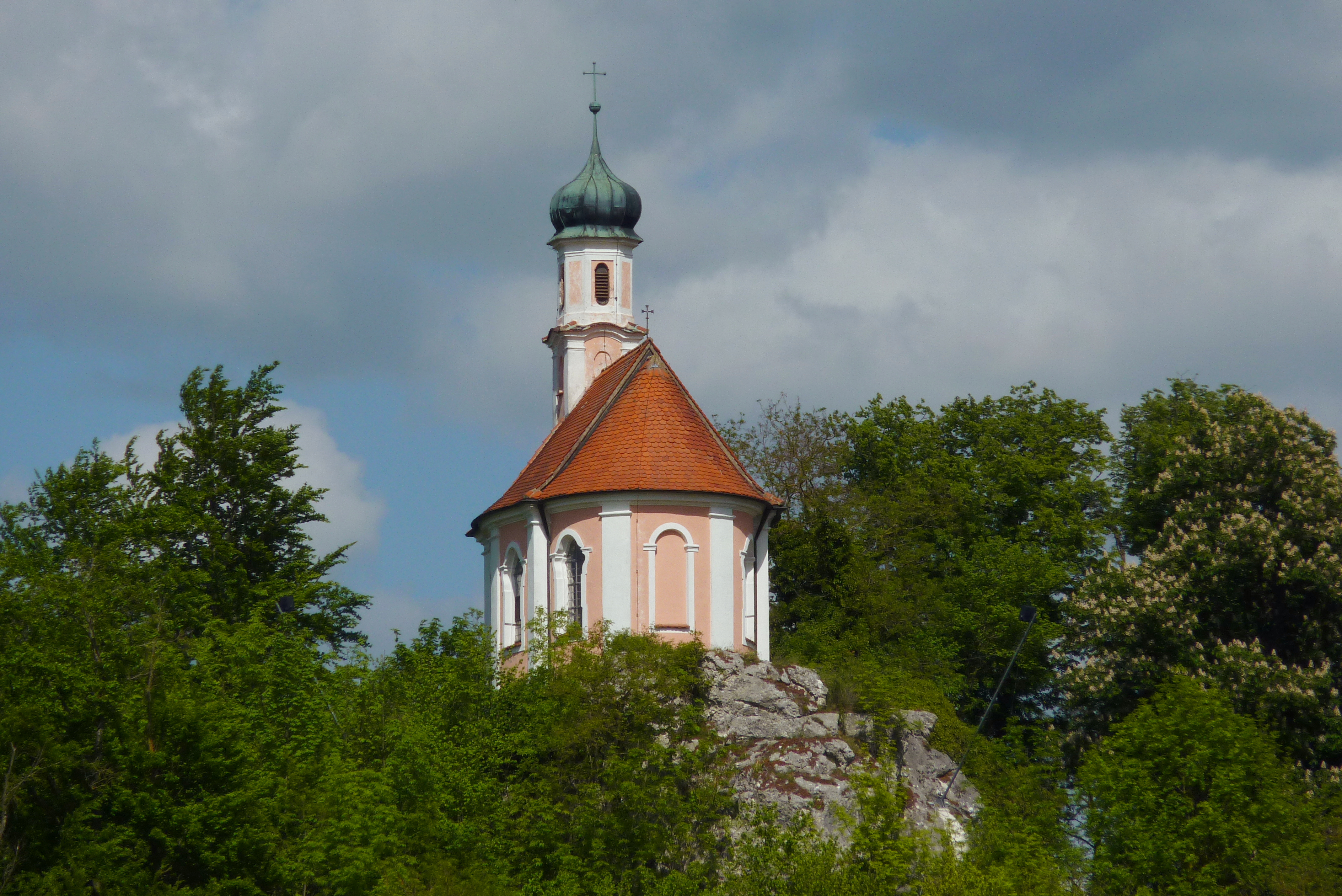 Kalvarienbergkapelle in Wörnitzstein, erbaut 1750 von Johann Georg Hitzelberger